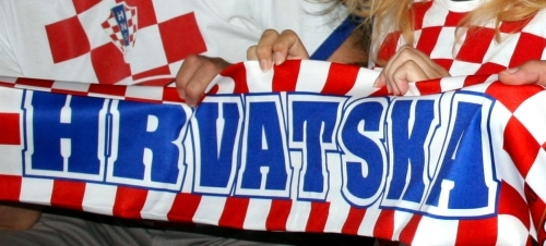 Hrvatski navijački šal, wikisusret u Zagrebu